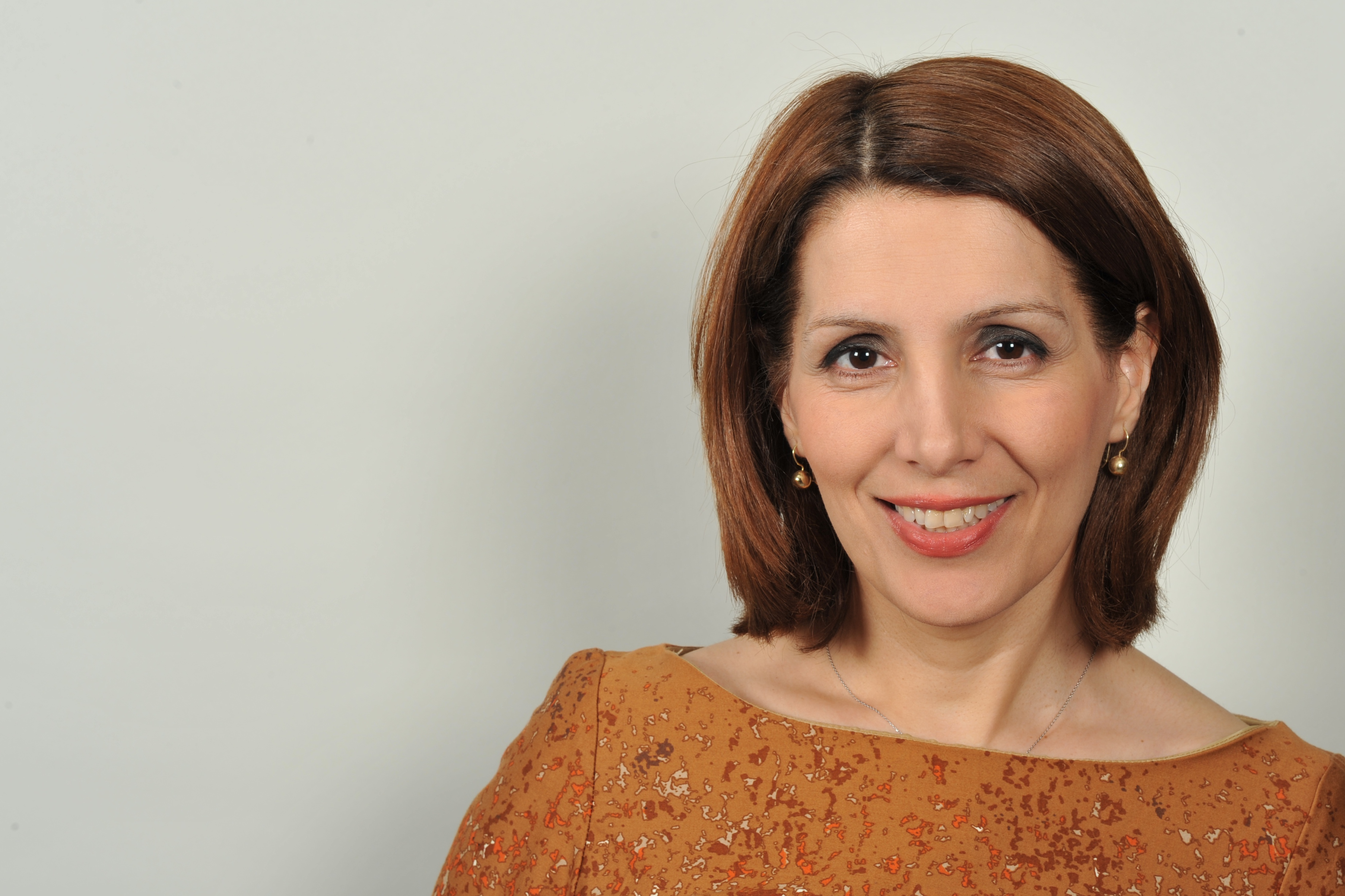 Landtagsprojekt Baden-Württemberg 2013: Bilkay Öney